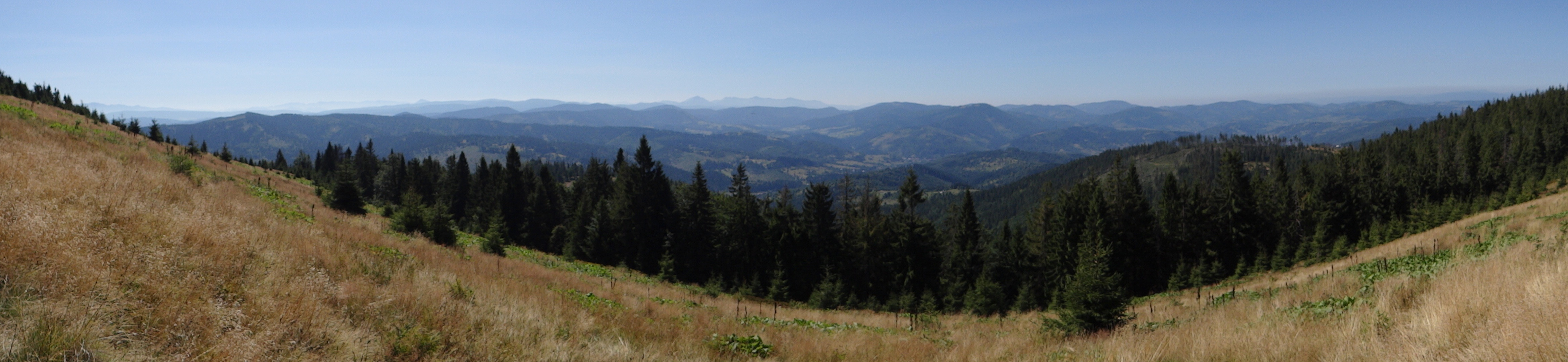 Hala Bacmańska i panorama widokowa